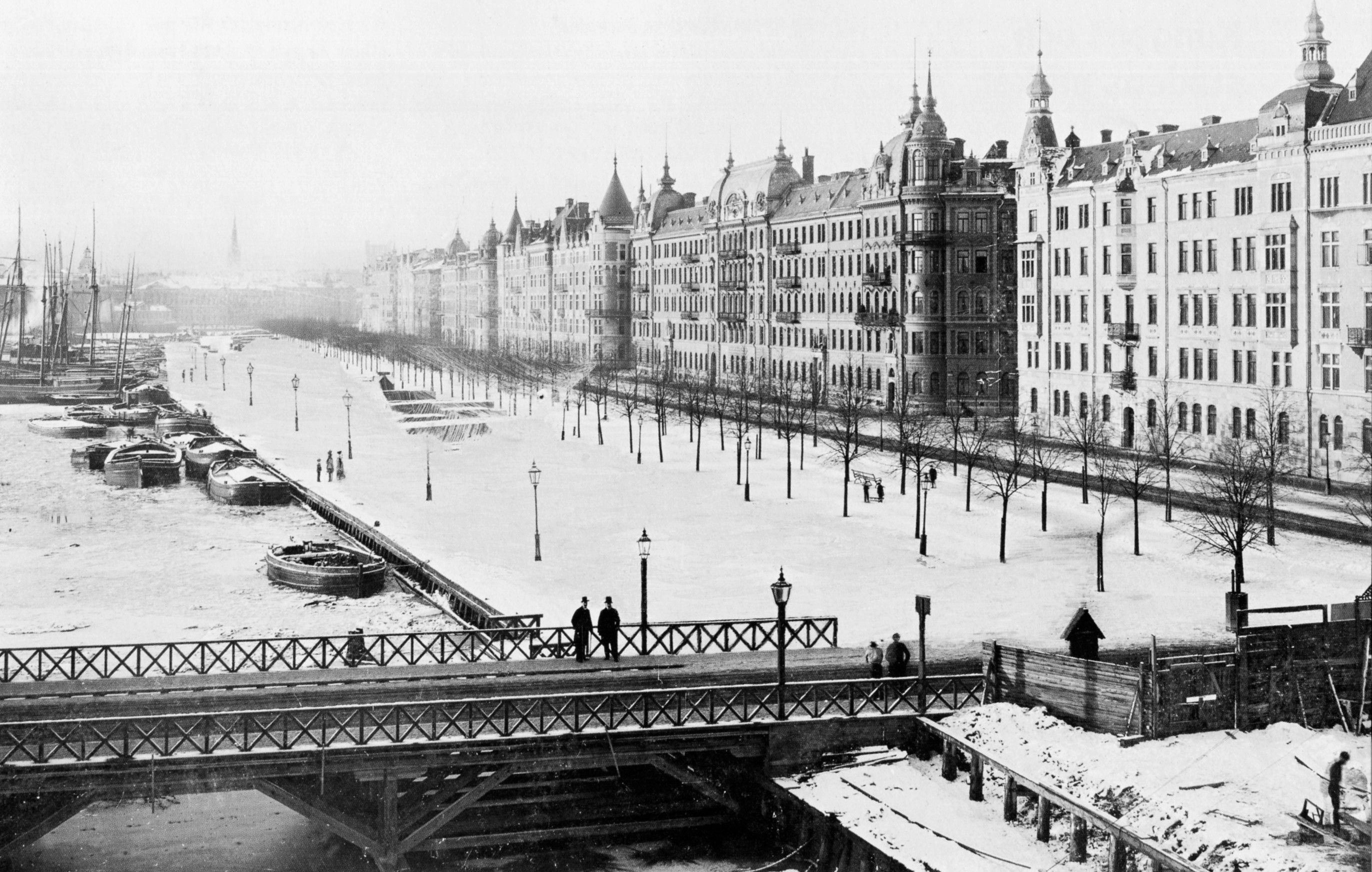 Strandvägen i Stockholm, vy mot väst, gamla Djurgårdsbron i föregrunden